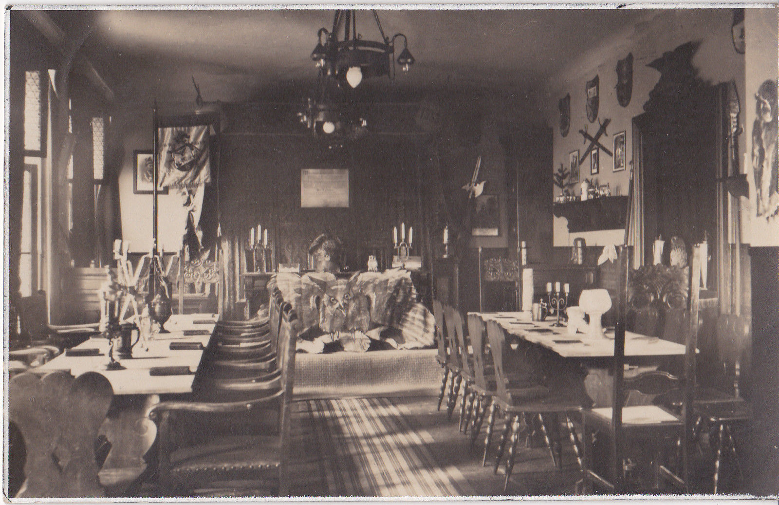 Die Regesmonia in Königsberg